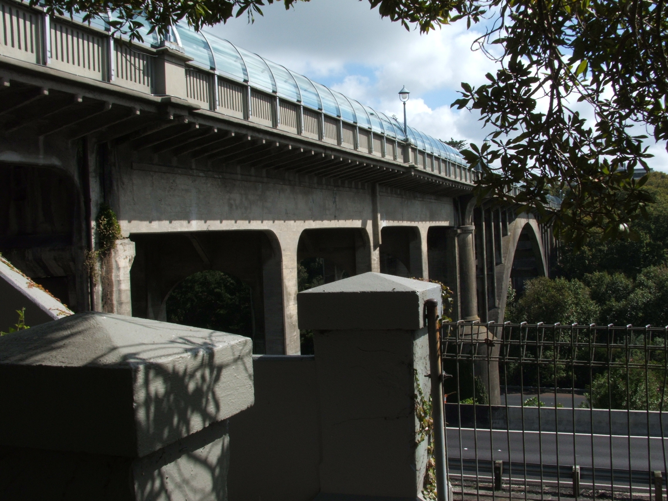 Grafton Bridge, Auckland, New Zealand.